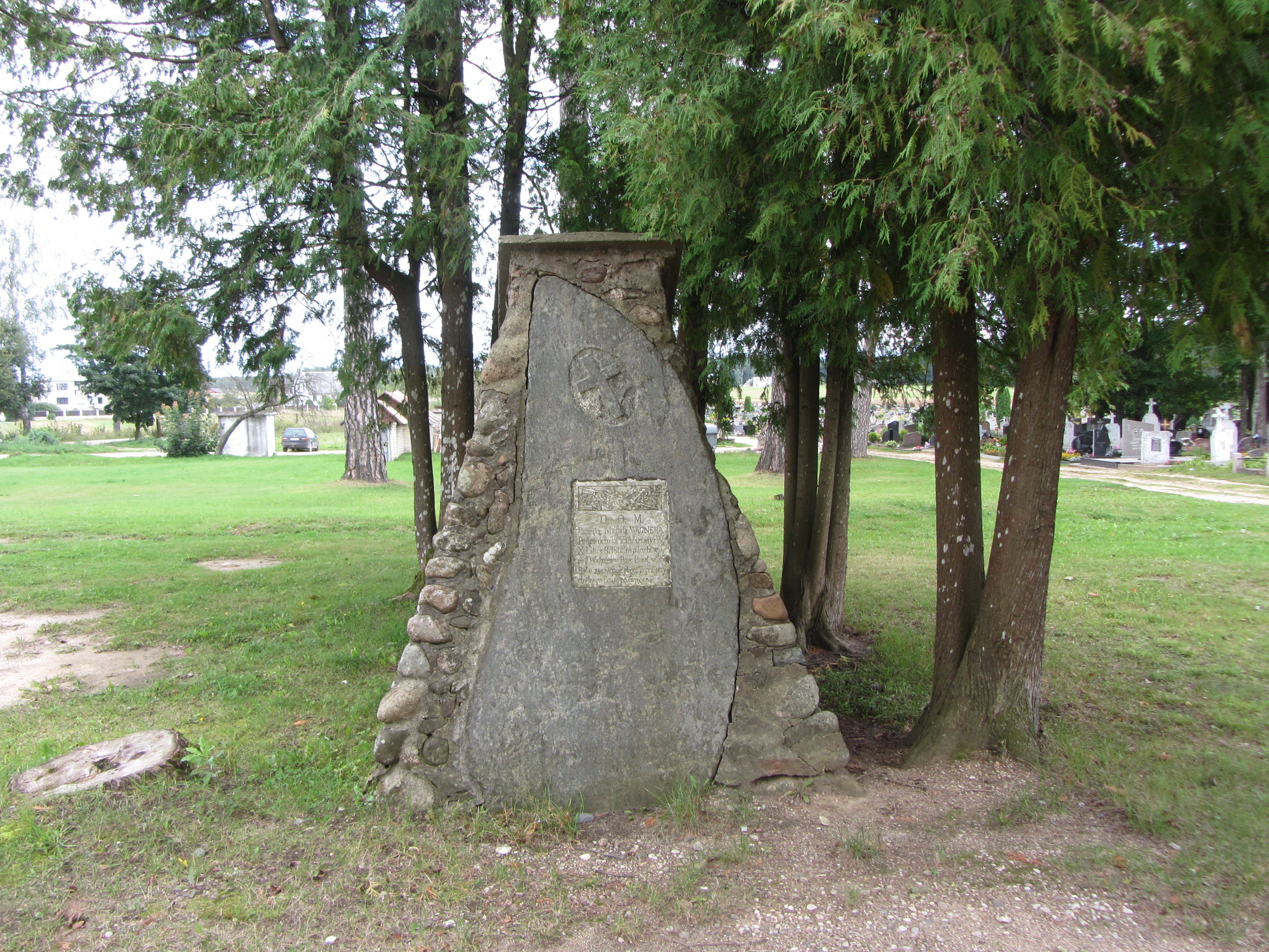 Šalčininkai, Lithuania